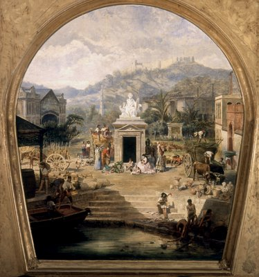 Boceto para la decoración del techo del Teatro Cervantes de Málaga